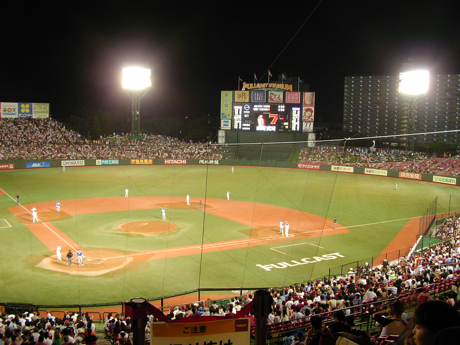 Sendai miyagikyuzyo 200607b